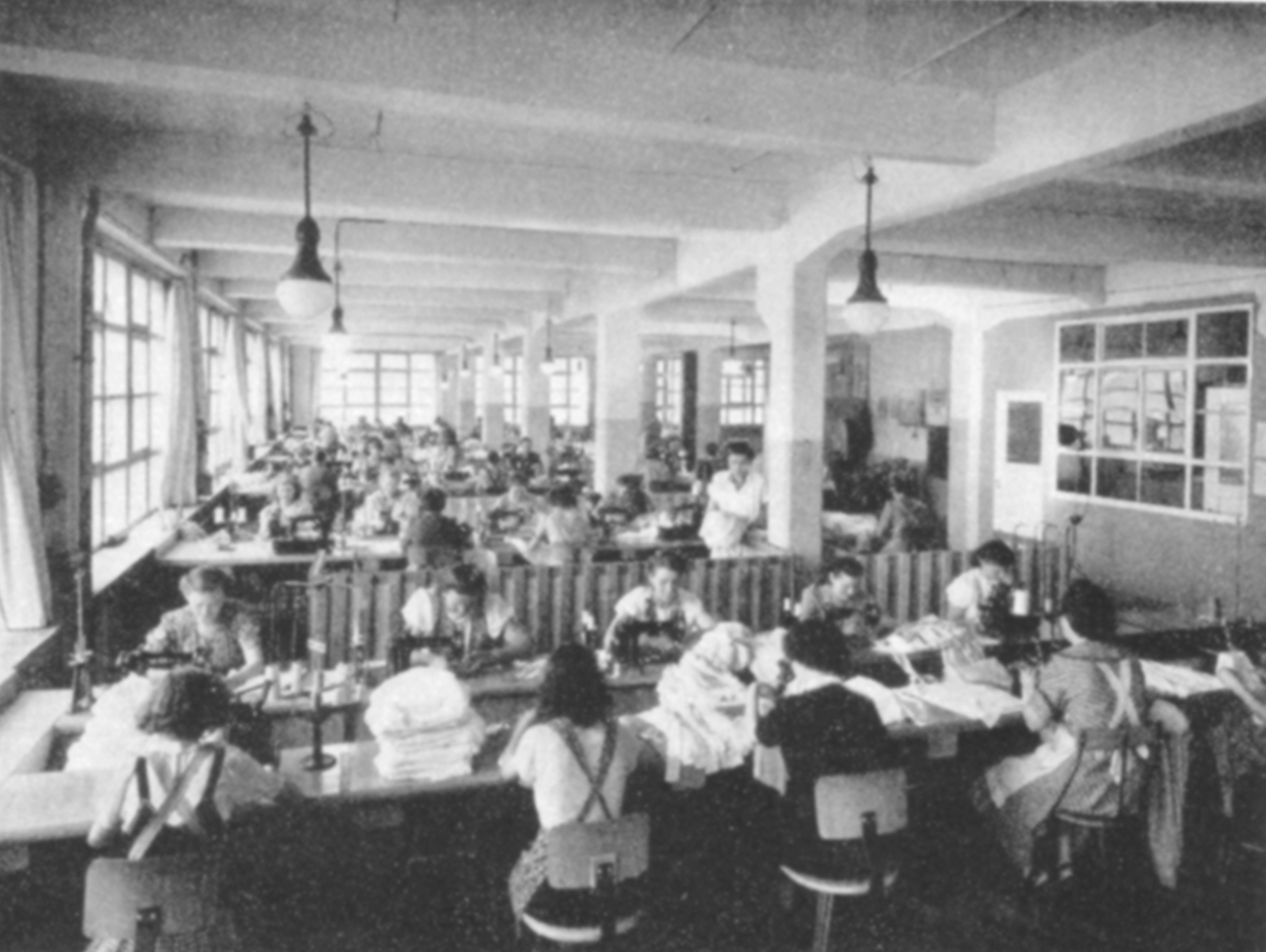 historische Innenansicht einer der Nahsäale von Hasana J.Hakenmüller in Albstadt-Tailfingen Mitte der 1950er Jahre. Die moderne Eisenbeton-Architektur im Stil des ´Neuen Bauens` ermöglichte schon ab 1930 eine Arbeitsweise ganz nach dem Motto der Bauhaus-Architektur "Mehr Licht, mehr Luft, mehr Raum". Foto: Sammlung-Metz, Tübingen